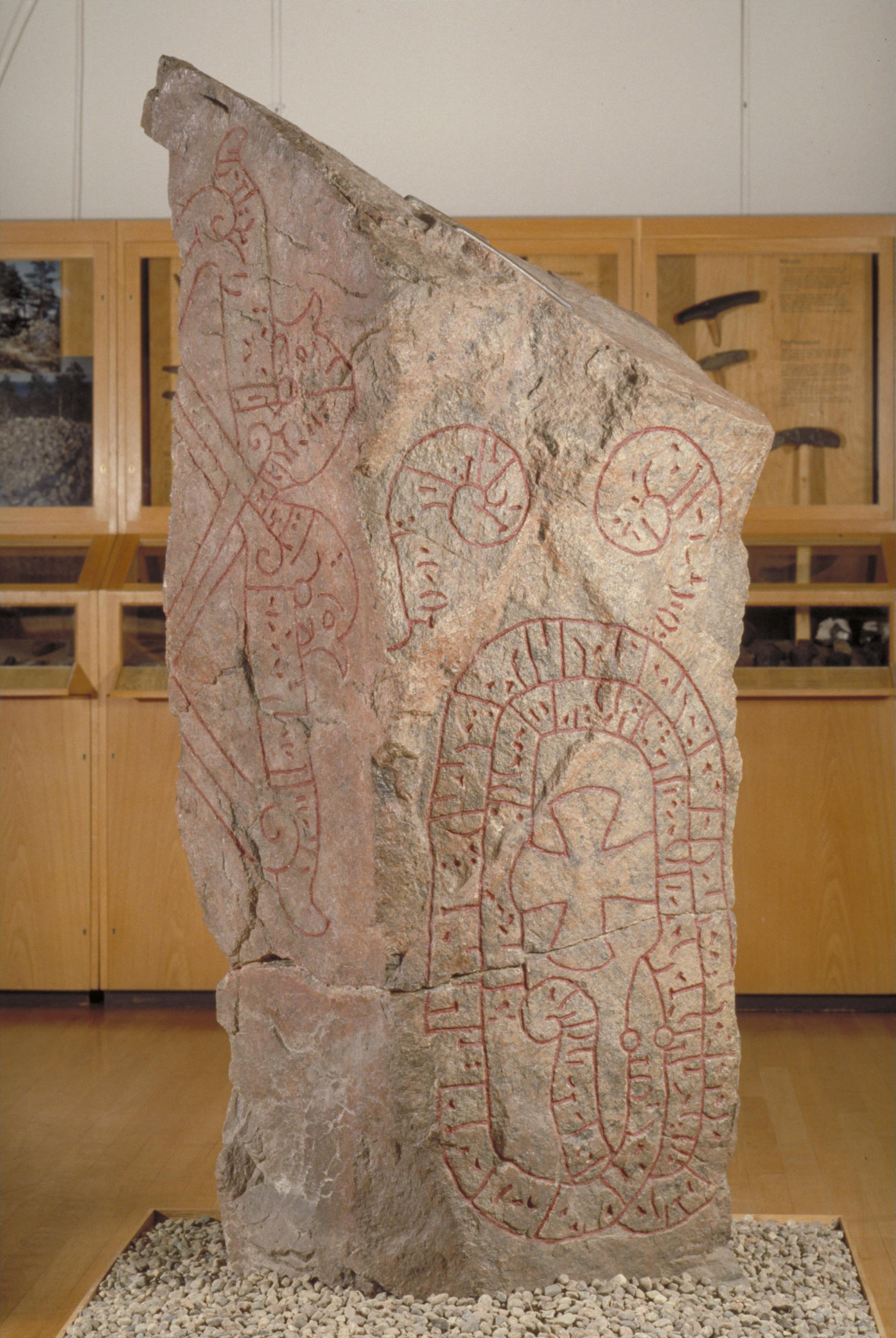 Runstenen som är ristad med stavlösa runor är rest av Frömund till minne av He-Gylfe. Hans släkt redovisas flera generationer bakåt liksom hans förvärv av jord. Stenen uppges vara hämtad i Balsten.